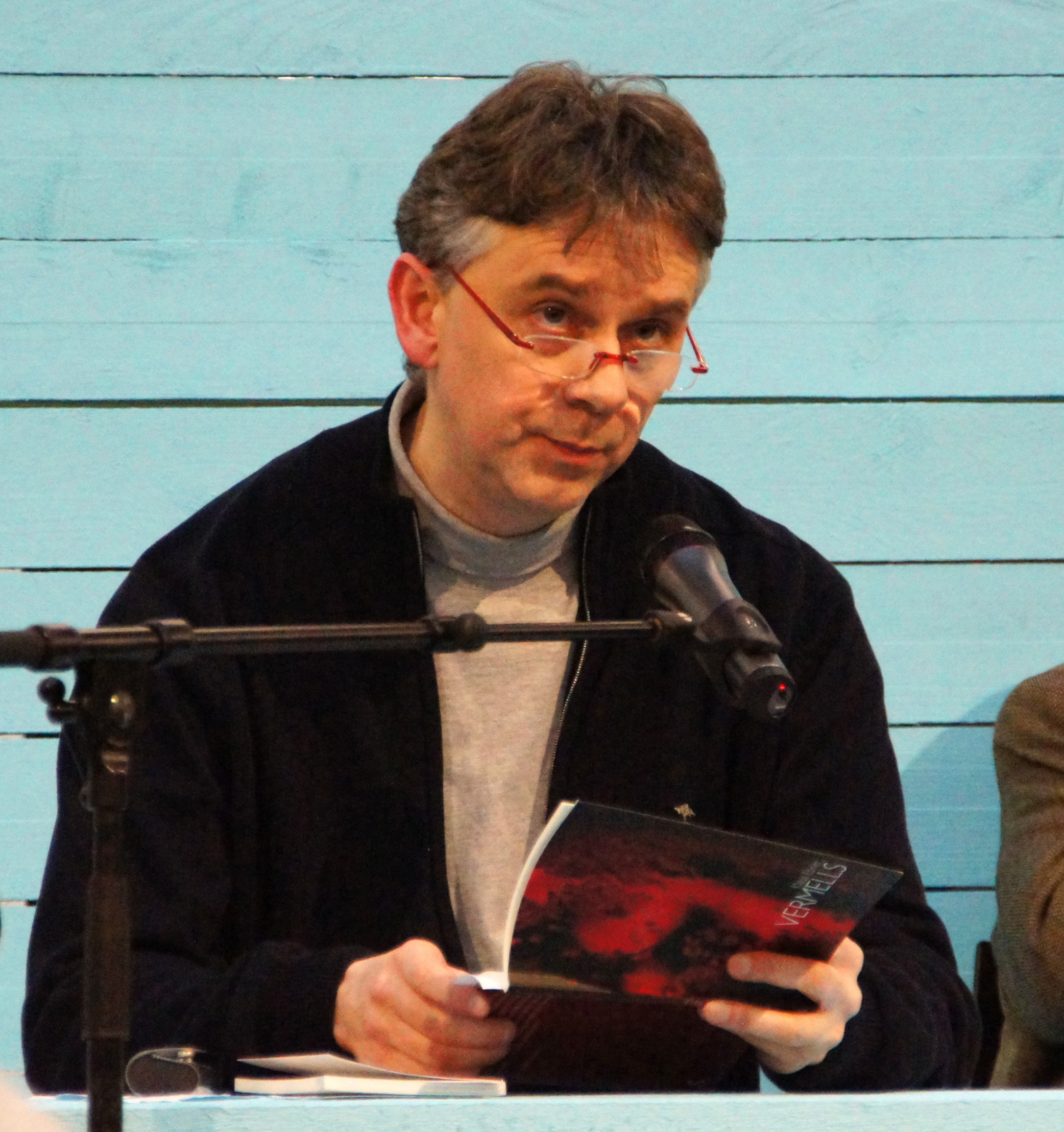 Unter dem Titel "Eine Versammlung kommt selten allein" lasen, anlässlich des 40. Jahrestages der Gründung, Lyriker und Lyrikerinnen der Grazer Autorinnen Autorenversammlung im "Salon für Kunstbuch im 21er Haus". Abgebildete Personen: S. Dateiname.